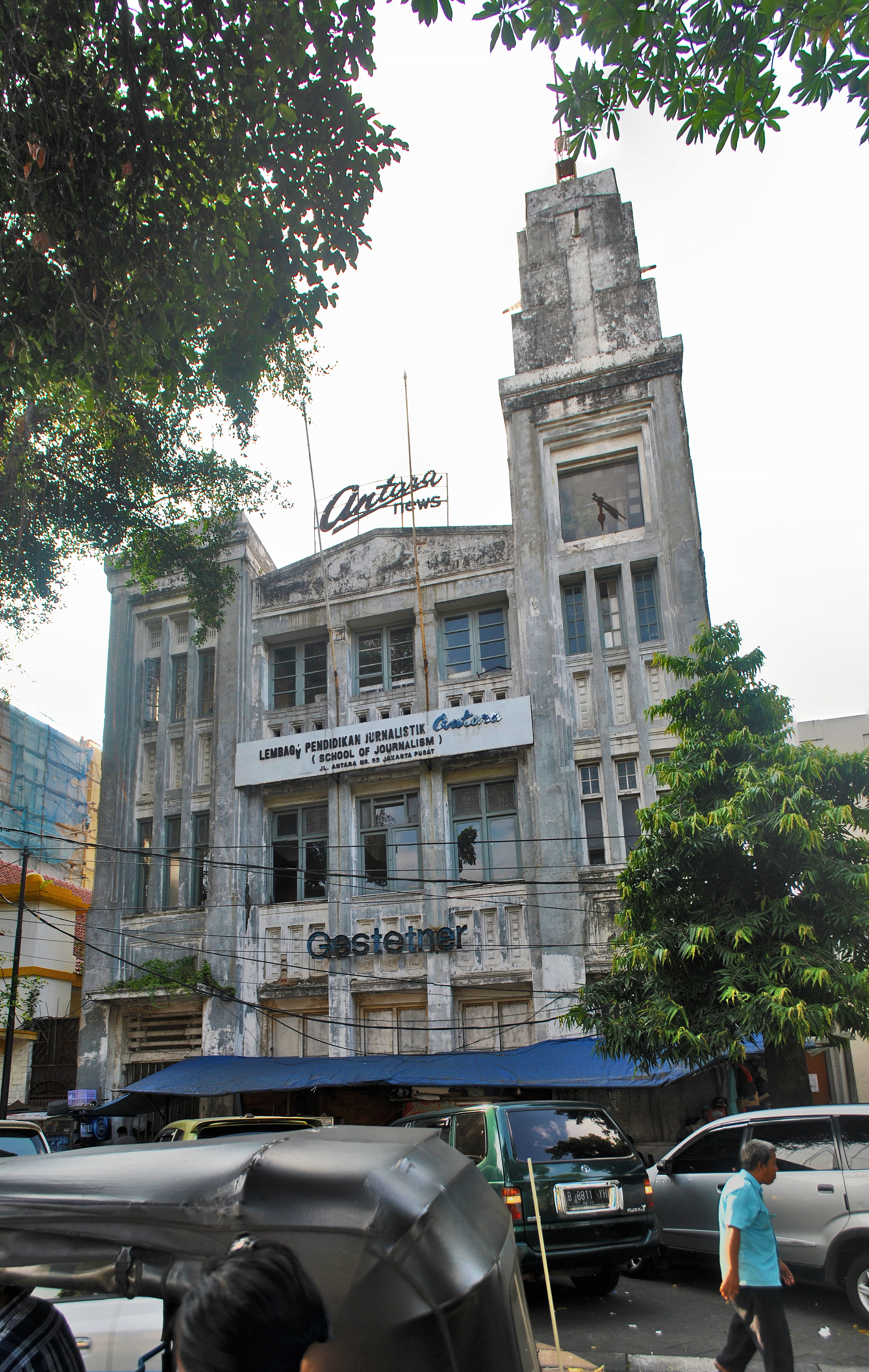 Former ANETA (official Dutch East Indies news agency), later Domei during fascist Japanese occupation and Antara between independence day until moved to brand-new Wisma Antara at Medan Merdeka Selatan in 1980. This building is currently abandoned. Di awal pendiriannya merupakan kantor berita ANETA (kantor berita Hindia Belanda), setelahnya menjadi kantor Domei di era pendudukan Jepang, dan sejak kemerdekaan hingga pundah ke Wisma Antara pada 1980, menjadi kantor berita Antara. Saat ini Gedung Aneta dalam keadaan terbengkalai.